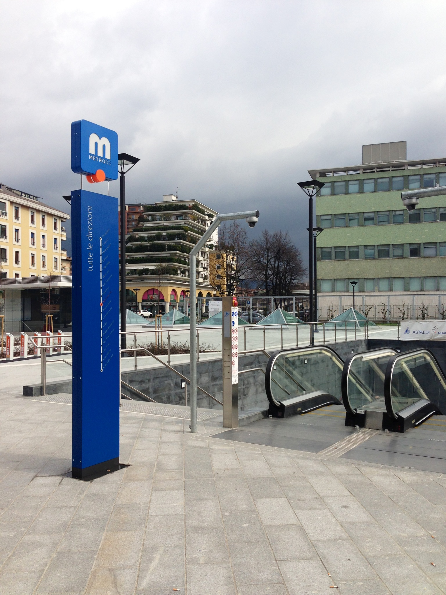 Totem all'ingresso della fermata di Stazione FS della metropolitana di Brescia